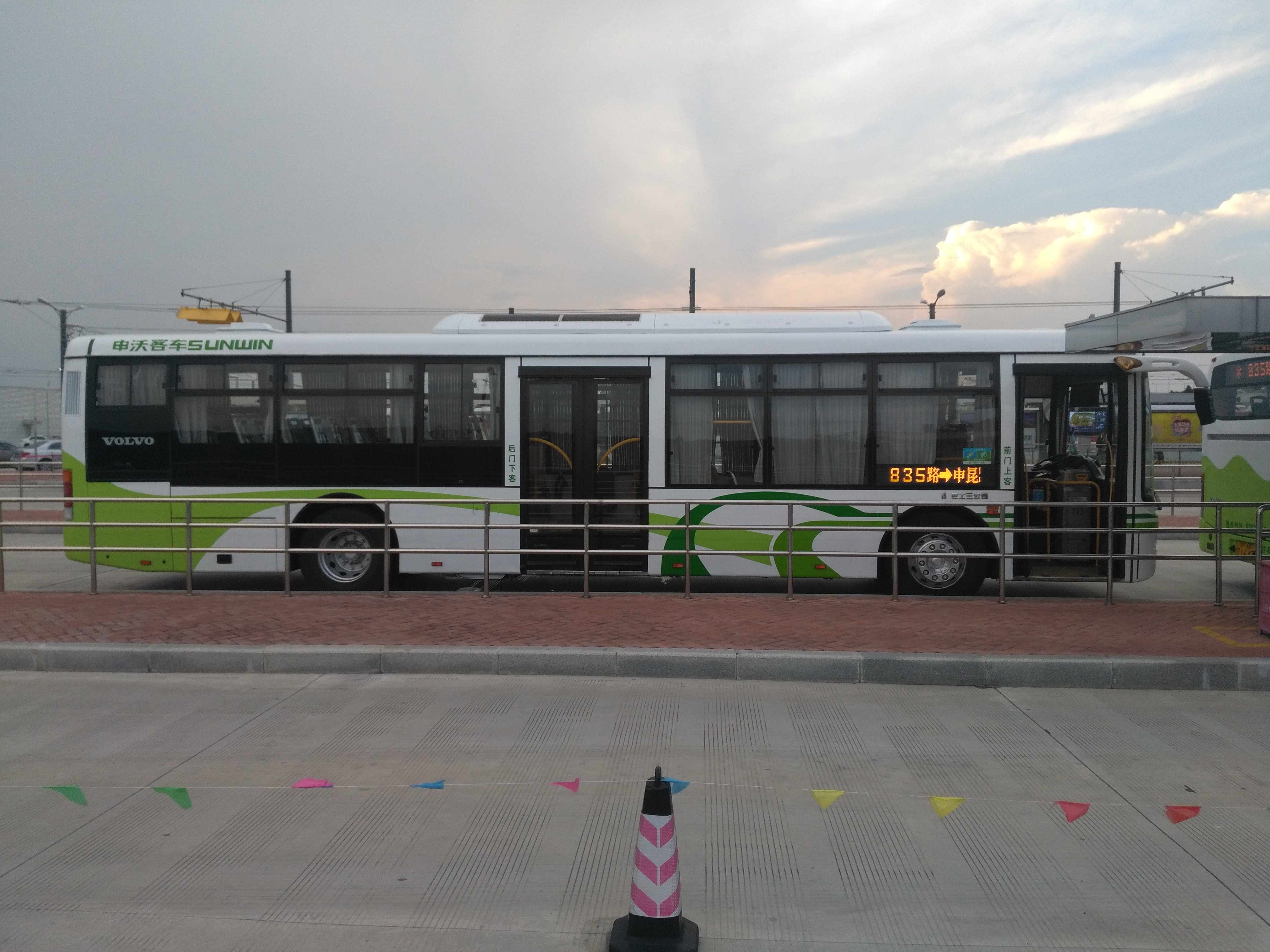 上海公交835路在申昆路停车场